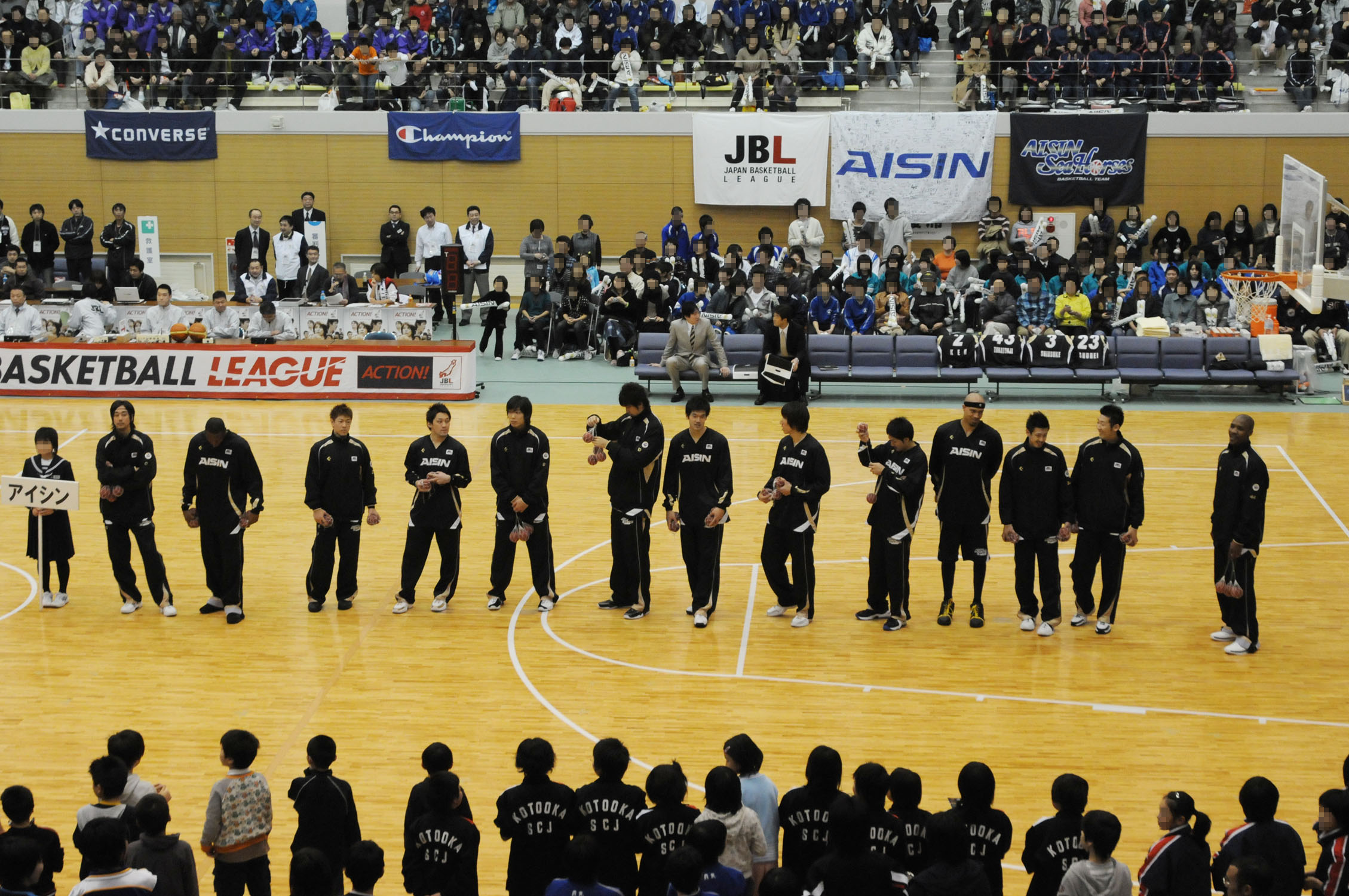 アイシンシーホース、琴丘総合体育館で。